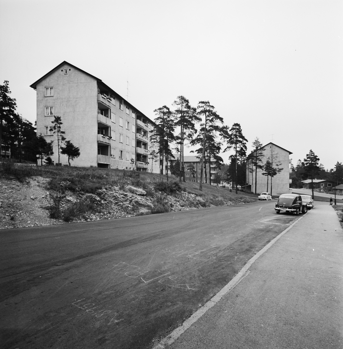 Ragna Nielsens vei på Tonsehagen. Foto: Rigmor Dahl Delphin (1965). Fra Byhistorisk samling hos Oslo Museum.